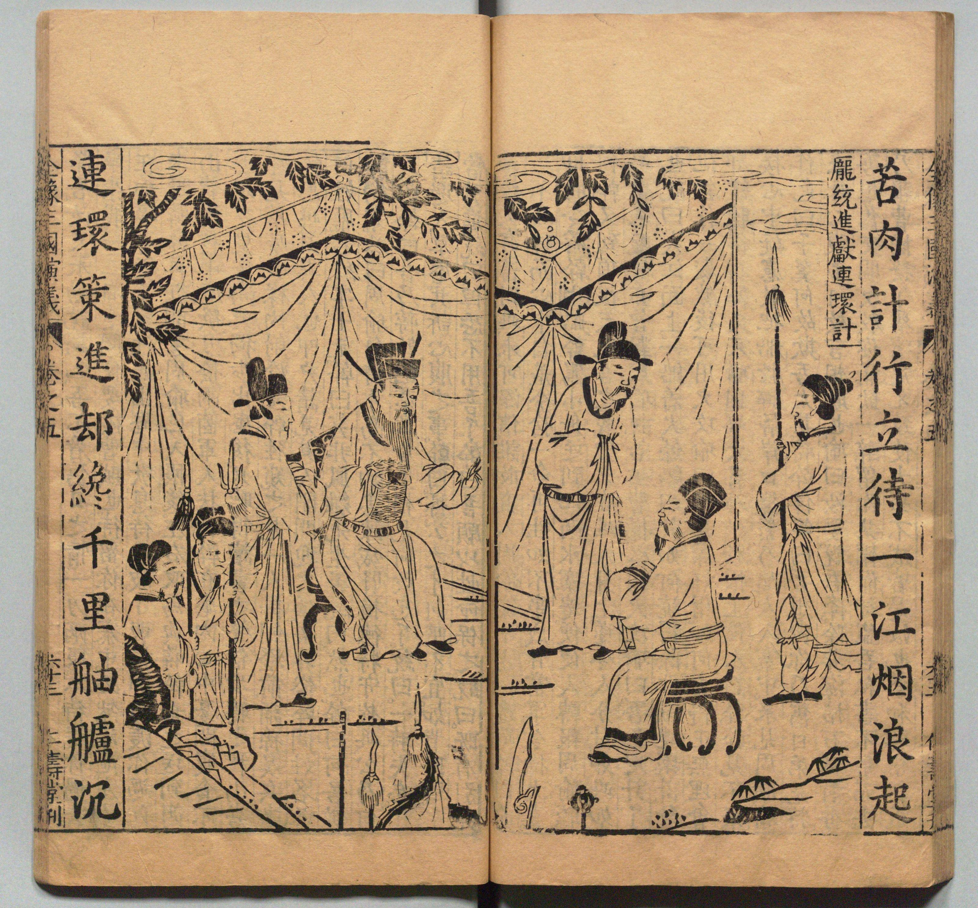 新刊校正古本大字音释三国志通俗演义 明万历十九年书林周曰校刊本